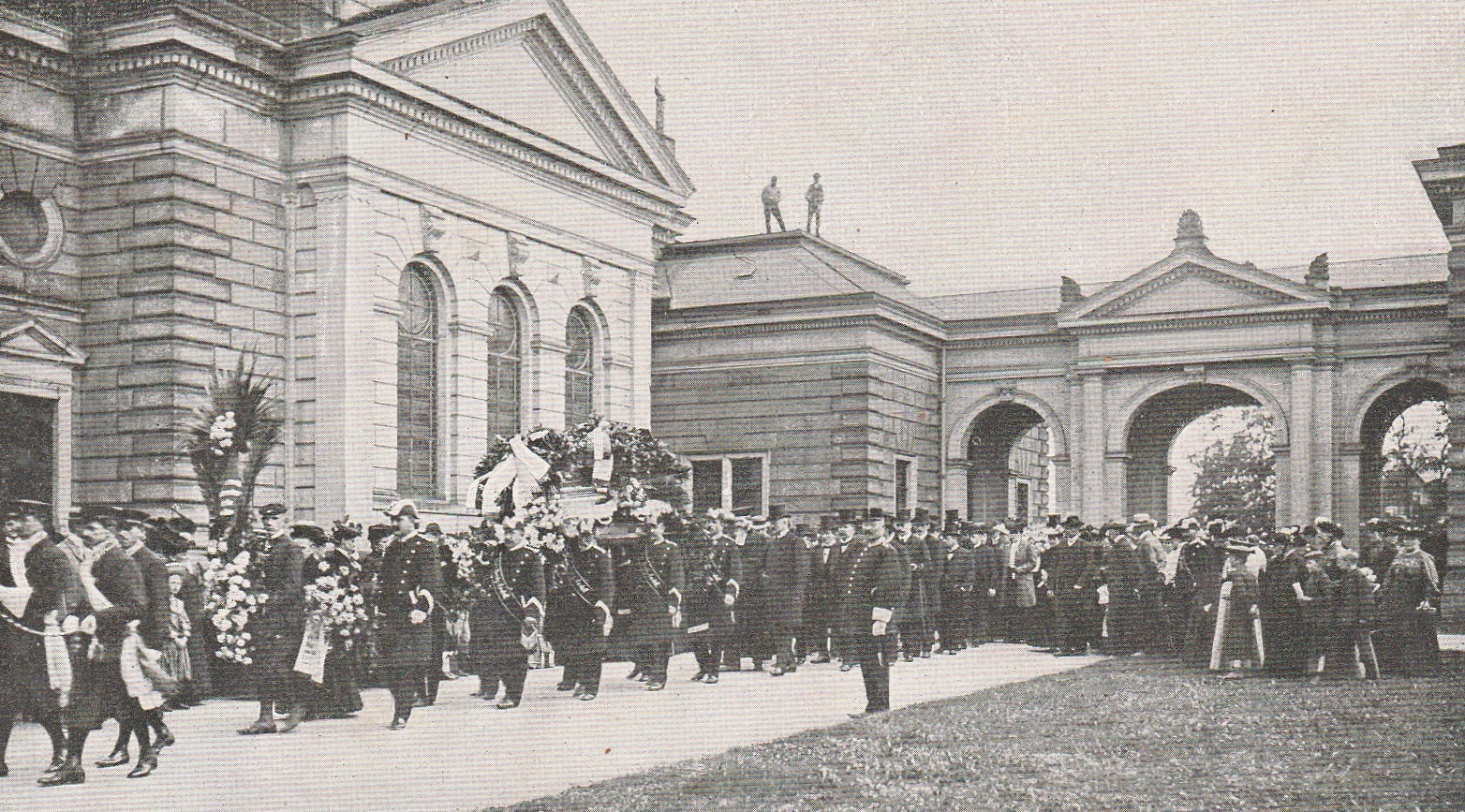 Trauerzug in Dresden für den tödlich verunglückten US-amerikanischen Radsportler Louis Mettling